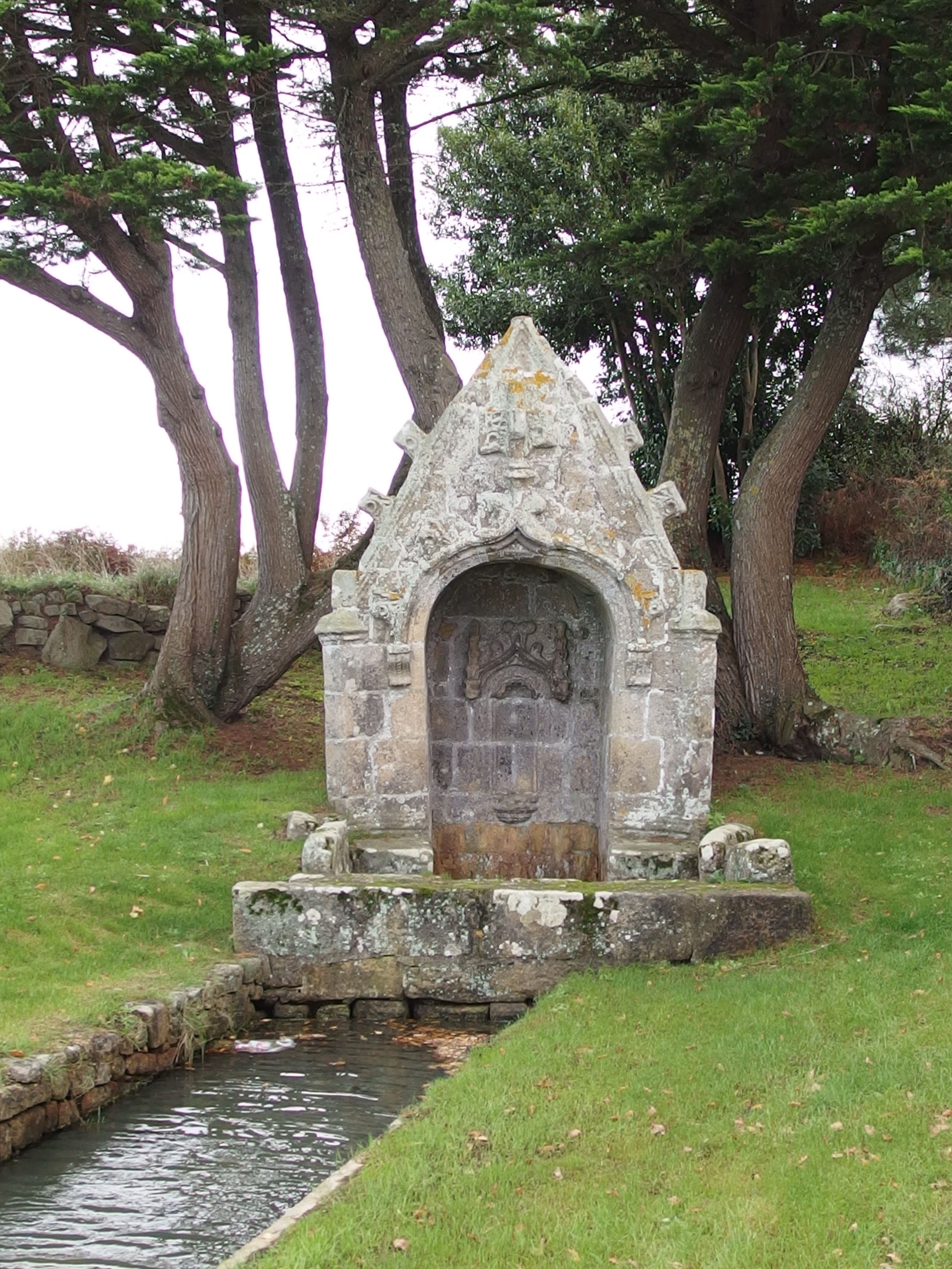 Carnac - Fontaine Saint-Colomban